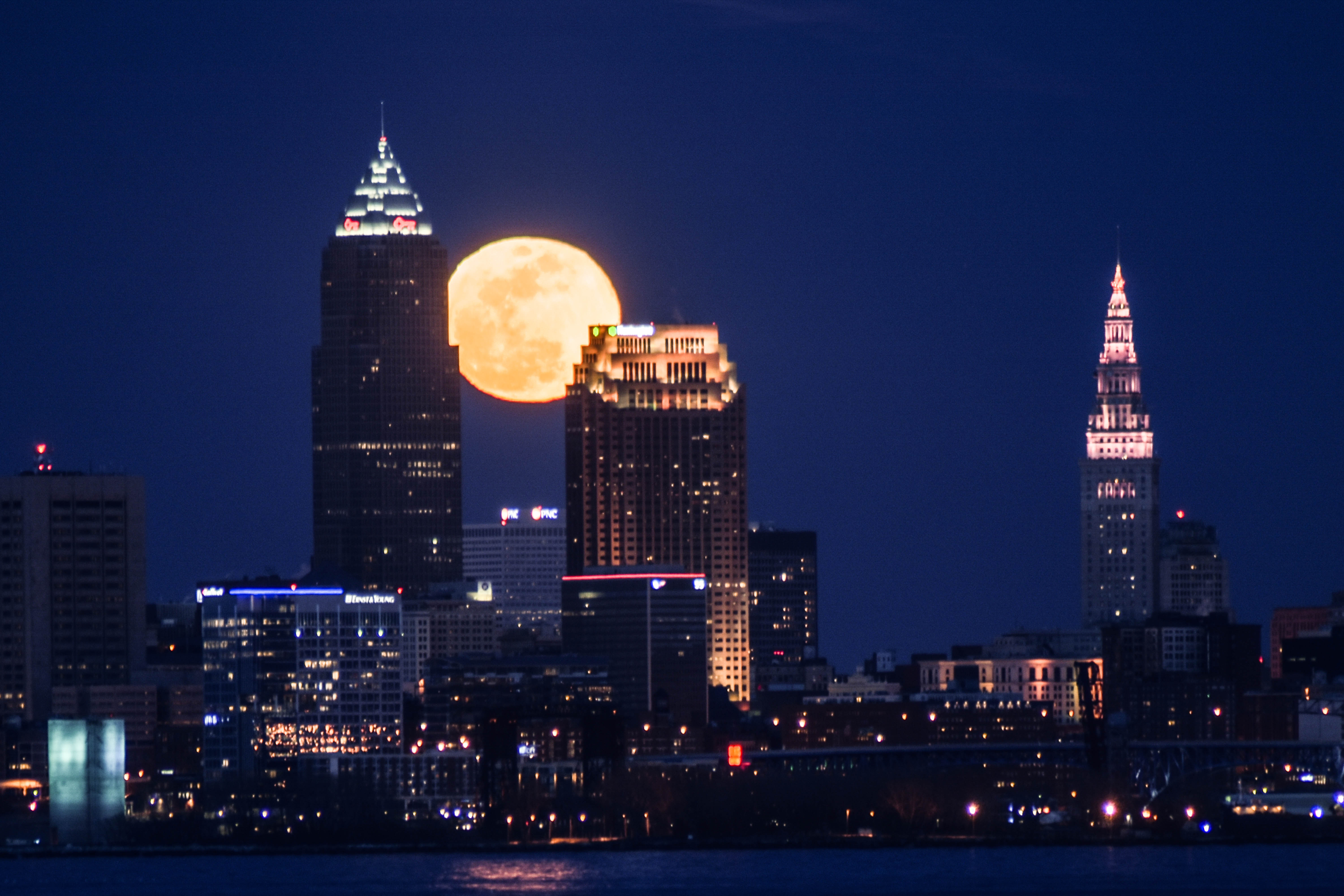 Moon over Cleveland